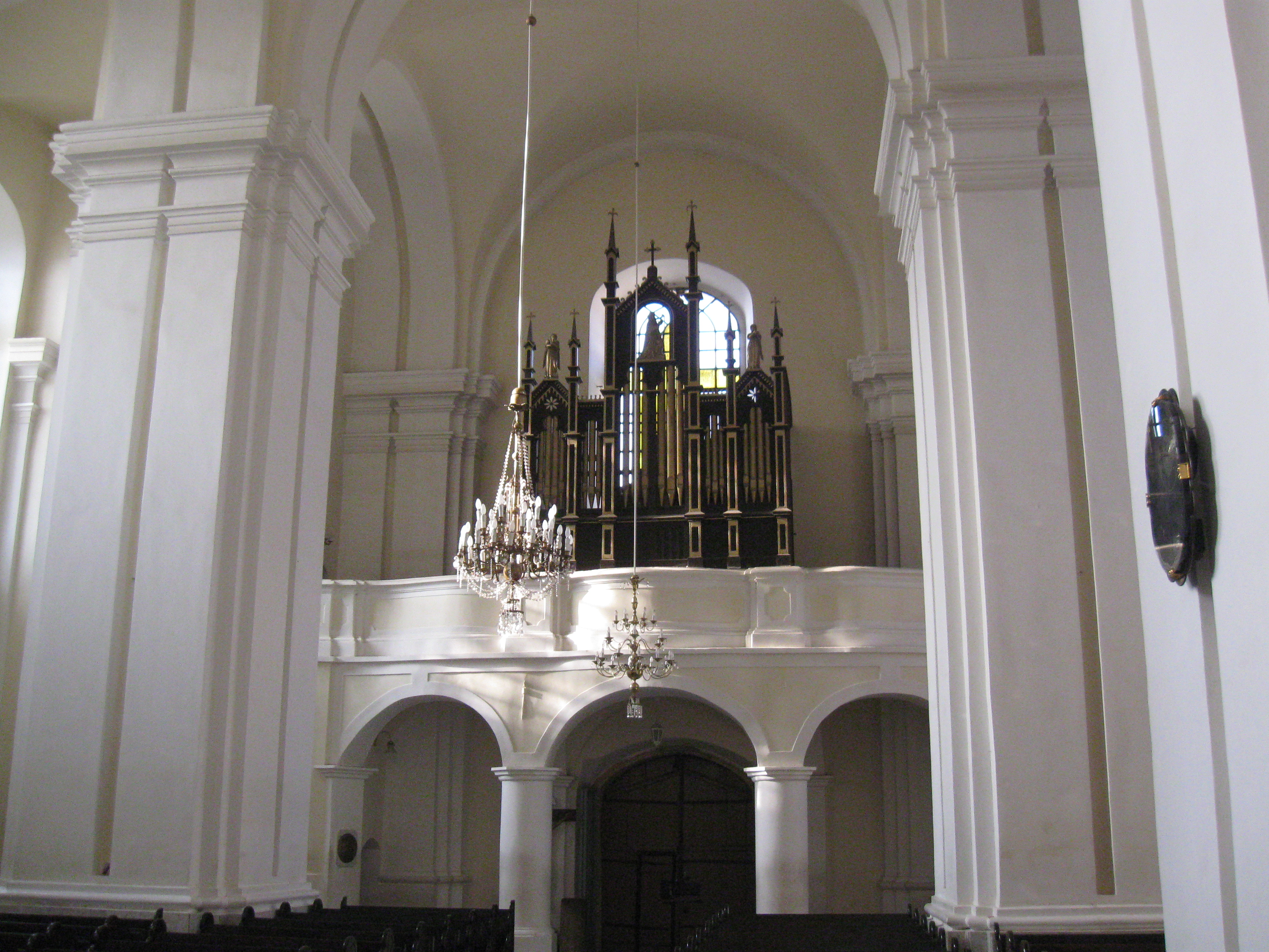 Беларуская (тарашкевіца): Ансамбаль былога кляштару бэрнардынцаў:Петрапаўлаўскі касьцёл, галоўны алтар касьцёлу, былы жылы корпус, агароджа. г. Іўе This is a photo of Belarusian heritage monument. Reference number: 412Г000286 ( WLM)